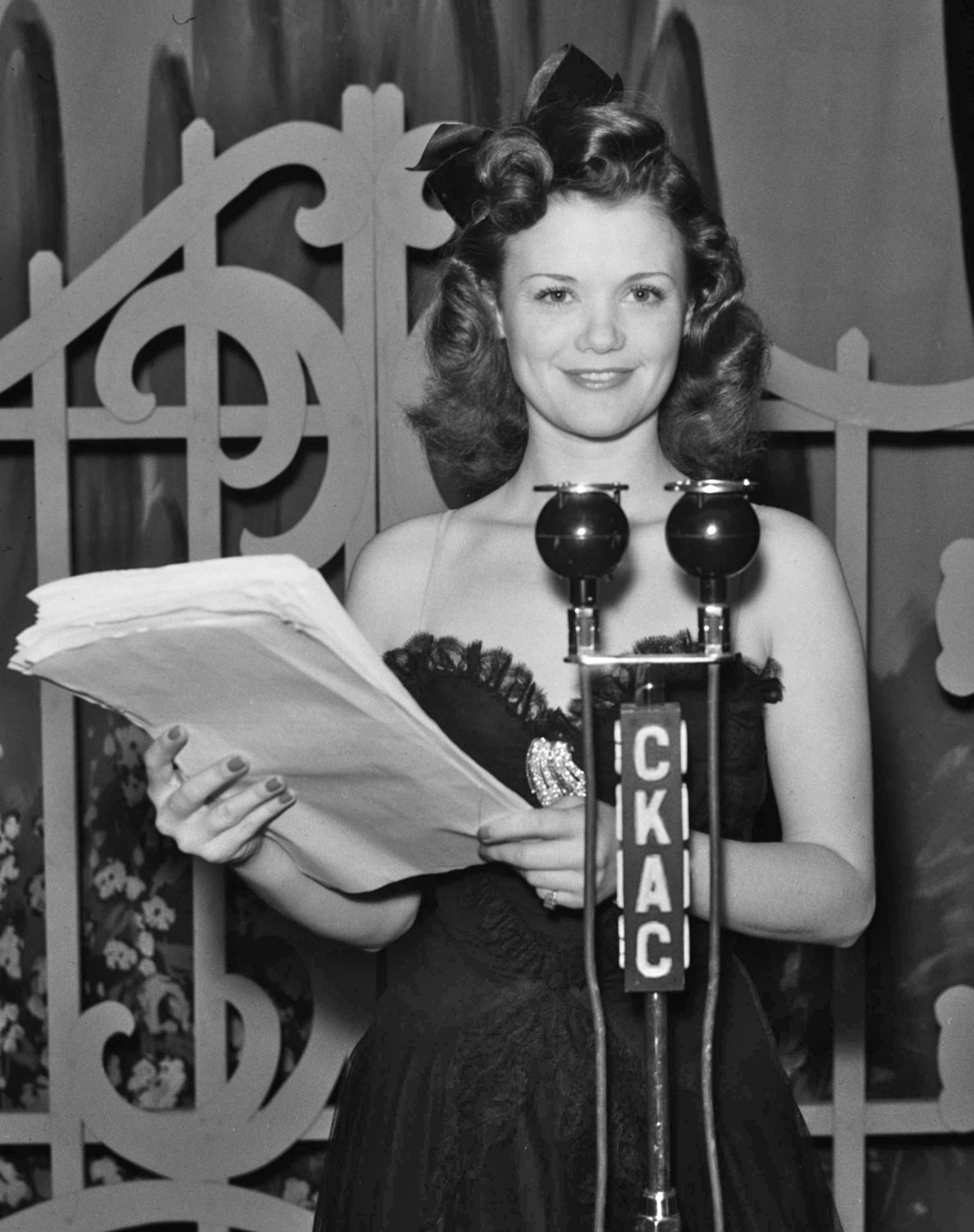 Simone Simon lors d'une présentation du radio-théâtre Lux diffusé par la station de radio CKAC de Montréal